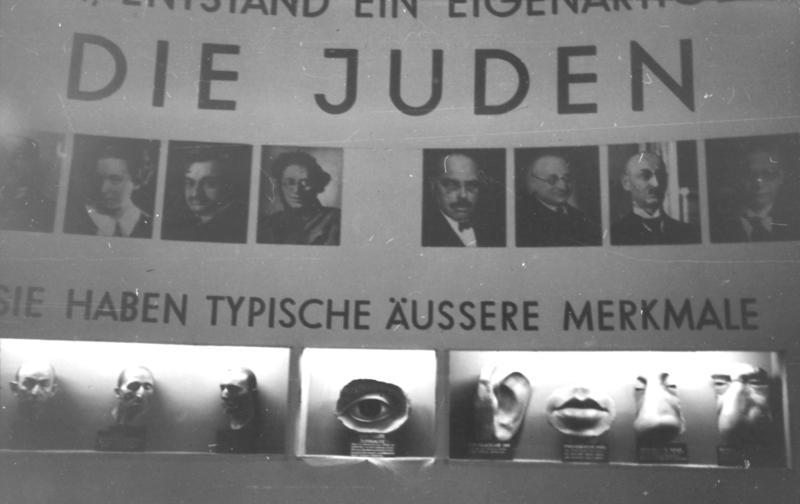 Ausstellung "Der ewige Jude" im Deutschen Museum, 7.-8.11.1937